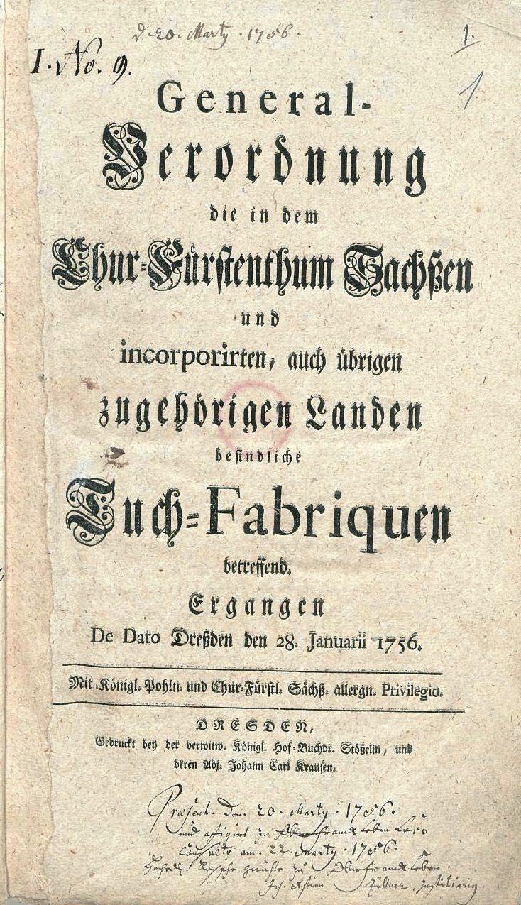 Titelblatt der „General-Verordnung die in dem Chur-Fürstenthum Sachßen und incorporirten, auch übrigen zugehörigen Landen befindliche Tuch-Fabriquen betreffend Ergangen De Dato Dreßden den 28. Januarii 1756“ [= Generalverordnung über die Tuchfabriken in Kursachsen, 1756]